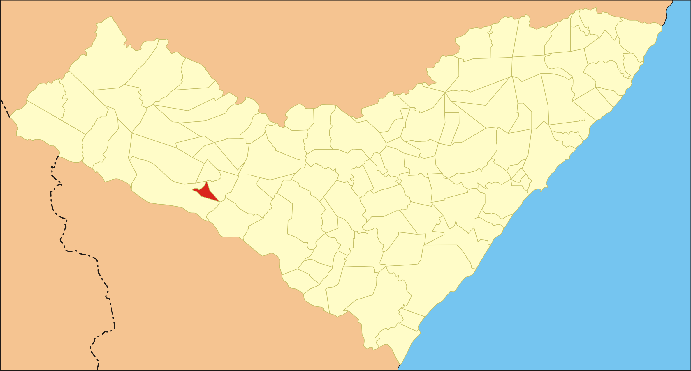 Localização da cidade no estado de Alagoas.